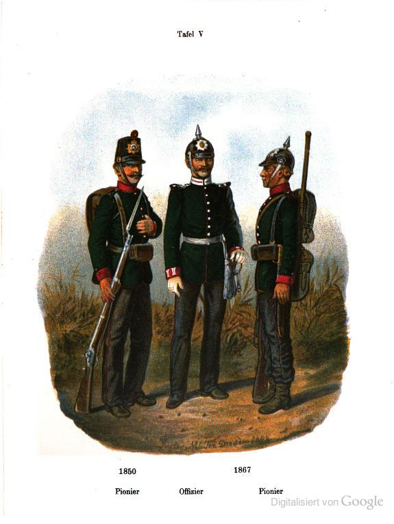 Uniformen des Sächsischen Ingenieurskorps